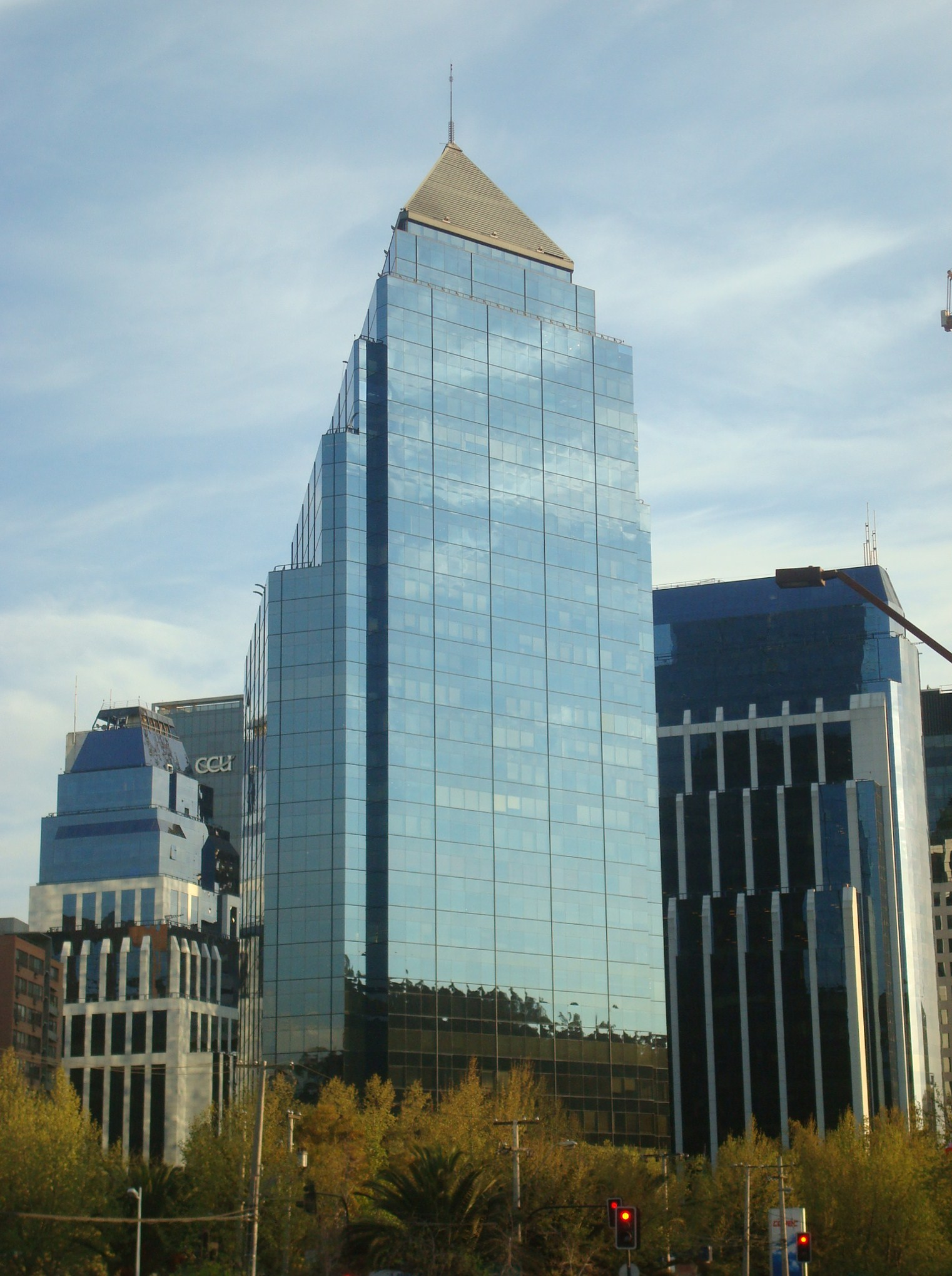 Torre de la Industria, Santiago, Chile